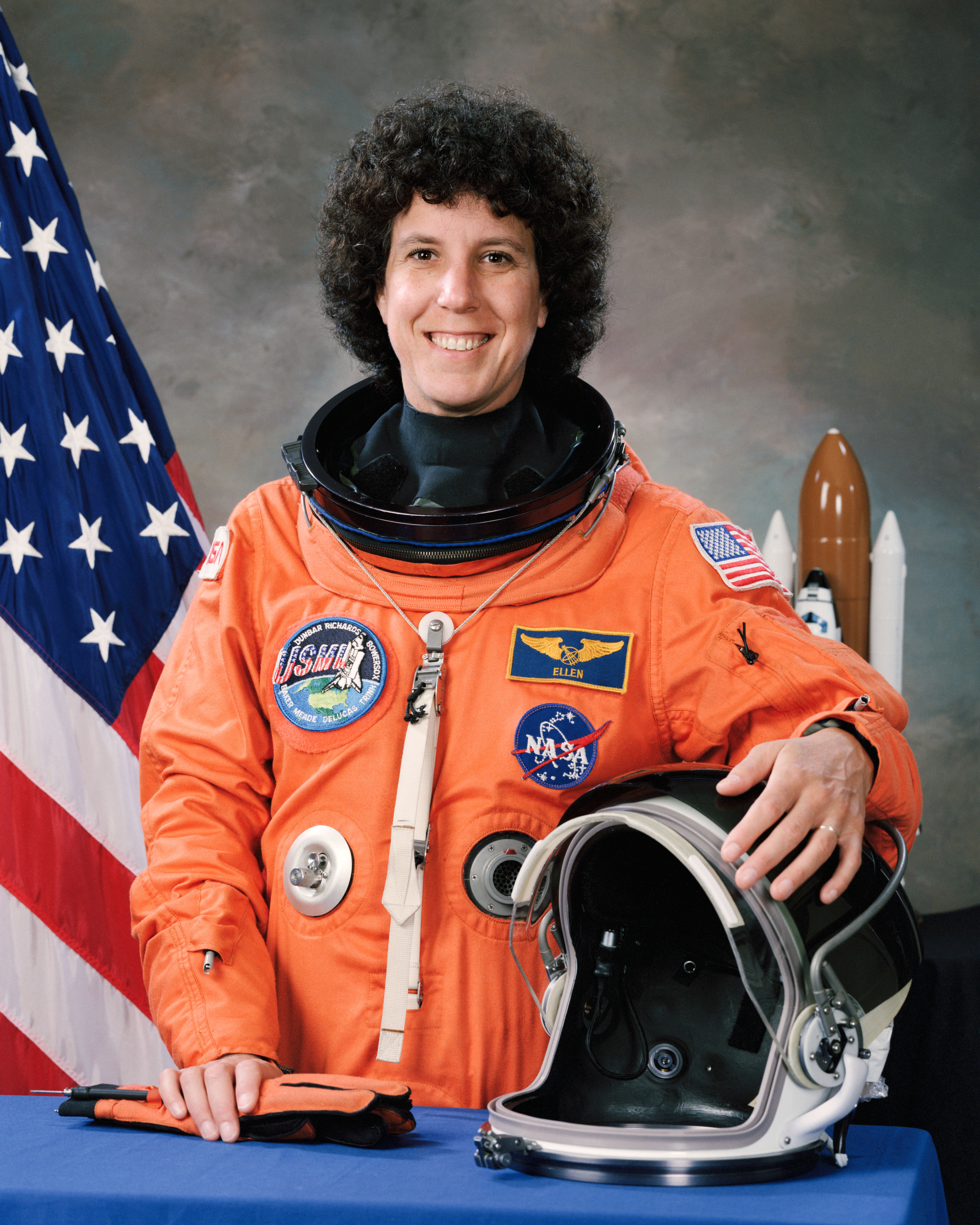 Baker, US Astronaut